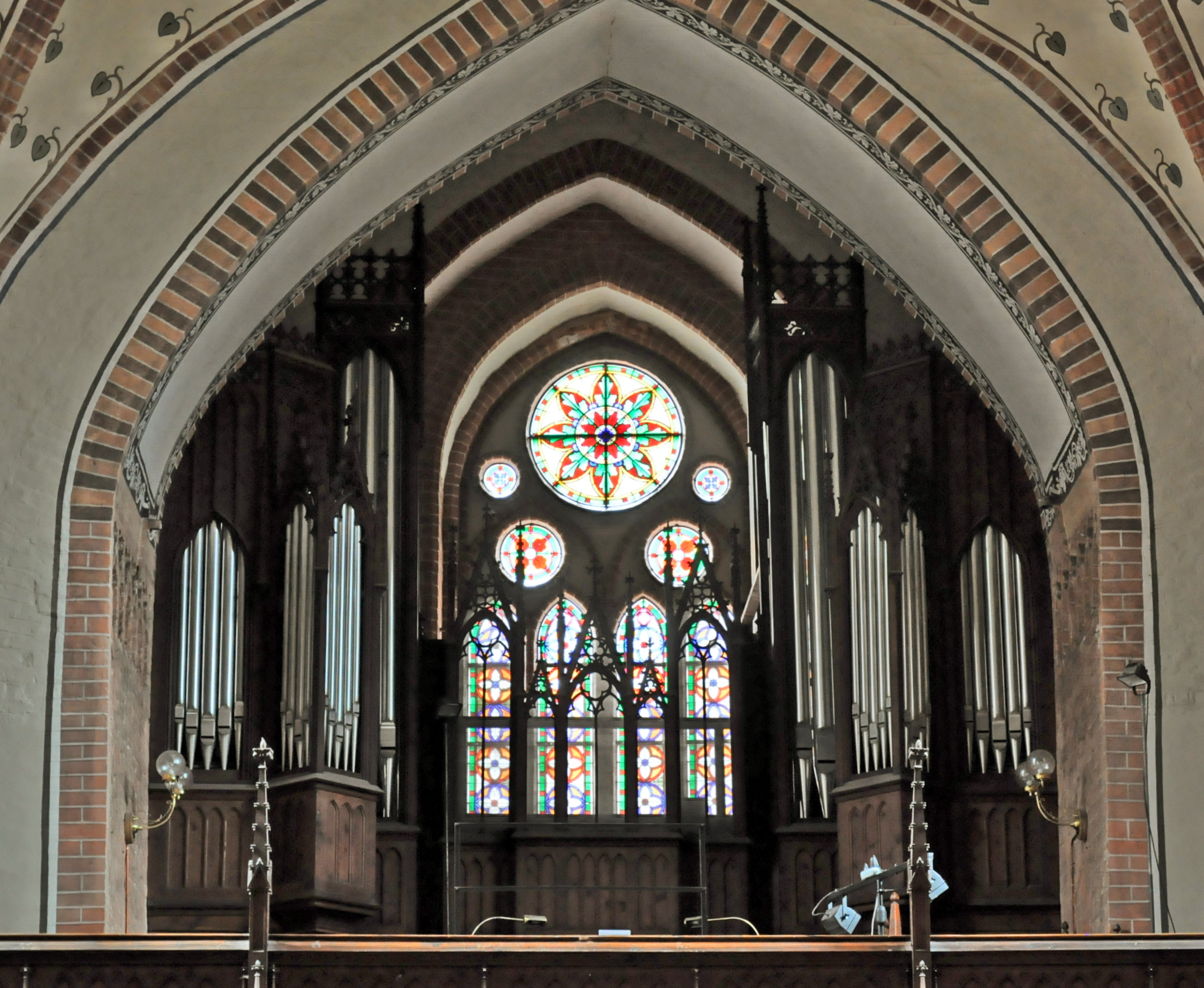 Orgel im Güstrower Dom, Mecklenburg-Vorpommern